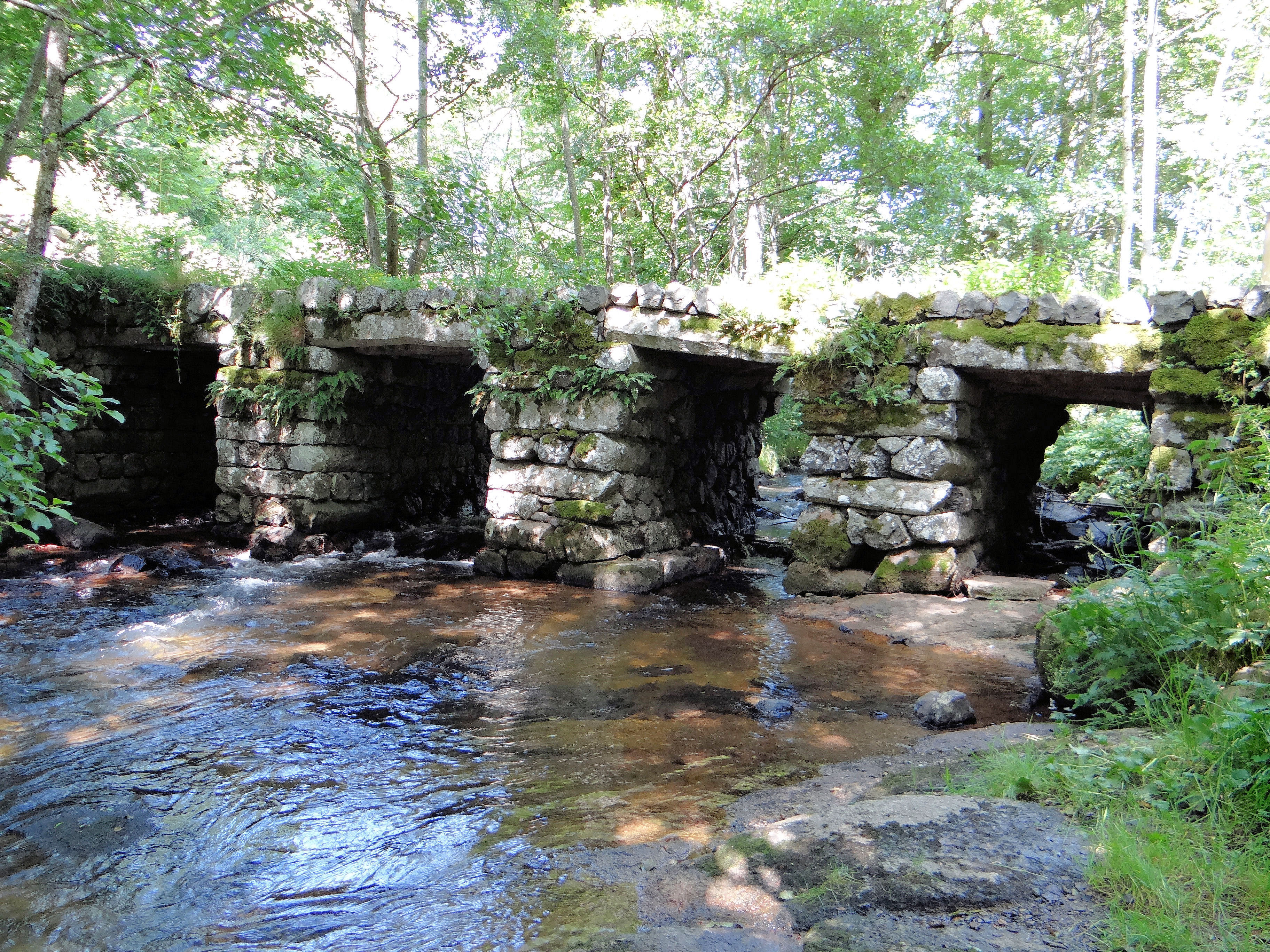 Laguiole - Pont de Pigasse - Ensemble vu de l'aval